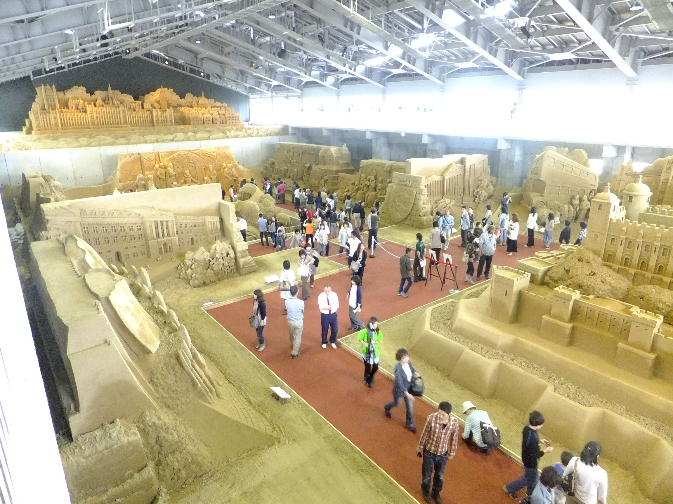 砂の美術館 美術品